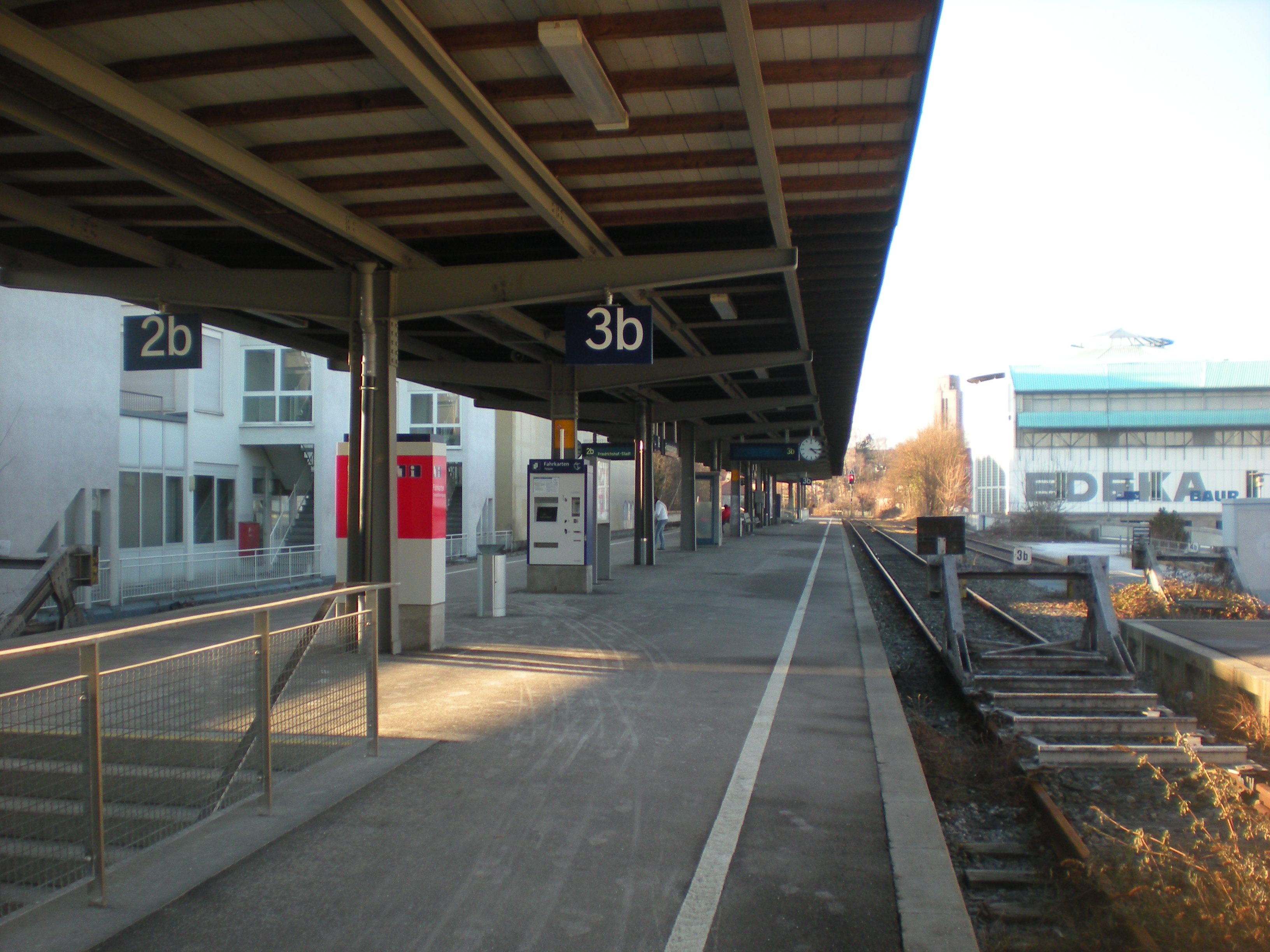 Bahnsteig des Bahnhofs Friedrichshafen Hafen